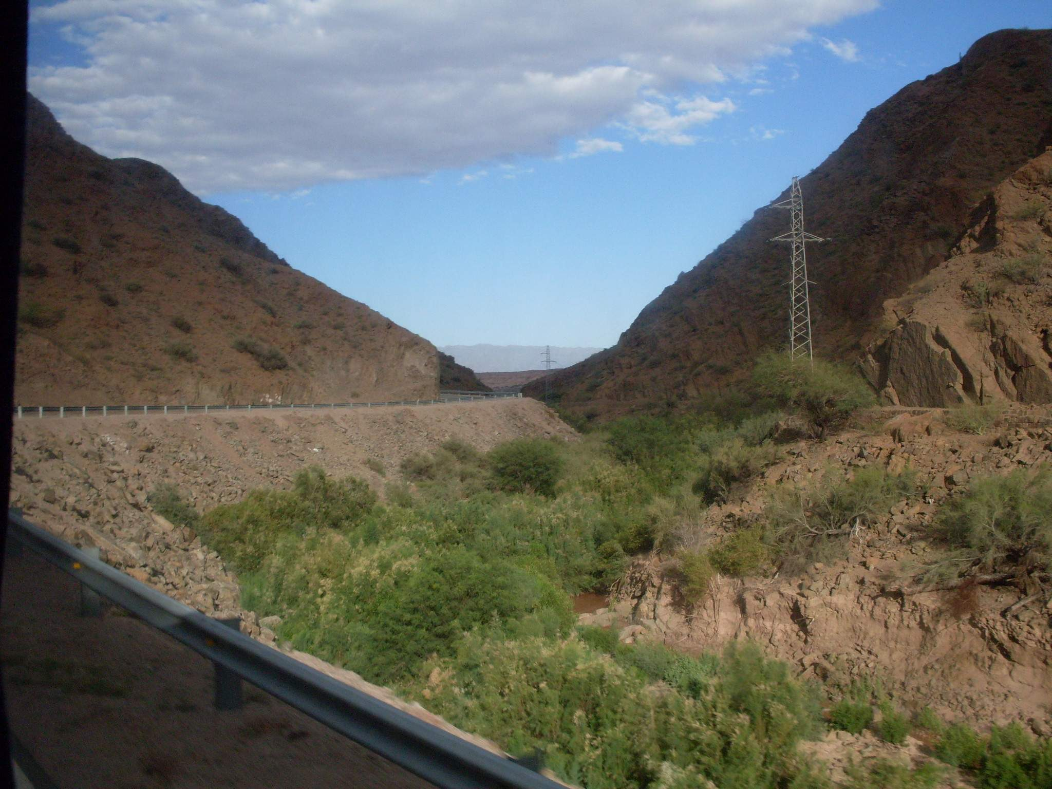 Quebrada de la Cébila. Catamarca y La Rioja, Argentina.